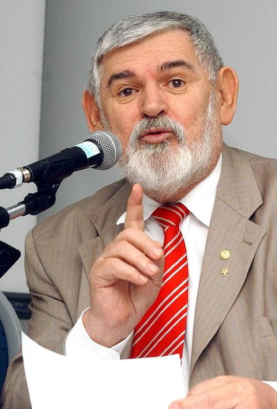 O presidente da Comissão de Direitos Humanos da Câmara dos Deputados, Luiz Couto, fala no Seminário Nacional para Enfrentamento da Violência contra a Pessoa Idosa.